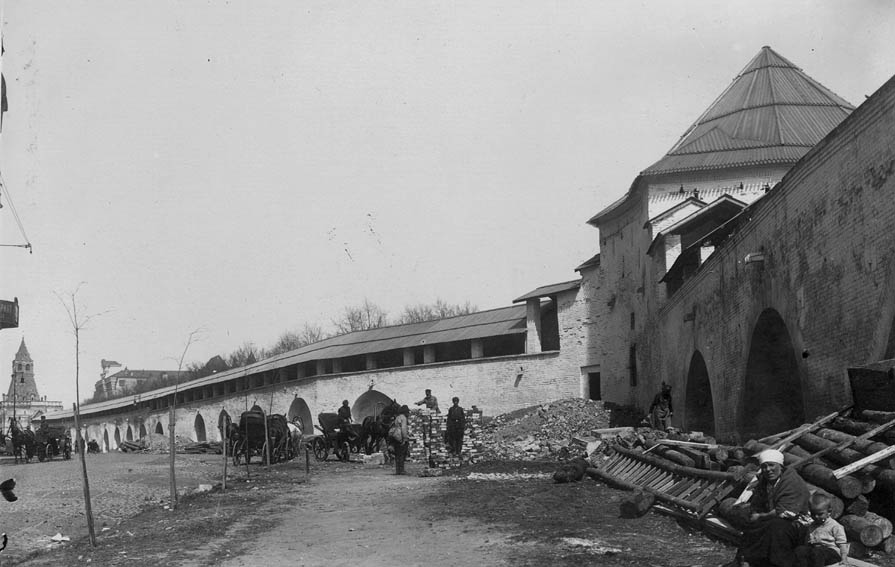 Реставрация Китайгородской стены